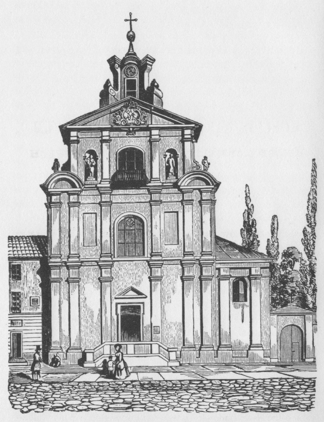 Kościół Narodzenia Najświętszej Maryi Panny w Warszawie na Lesznie